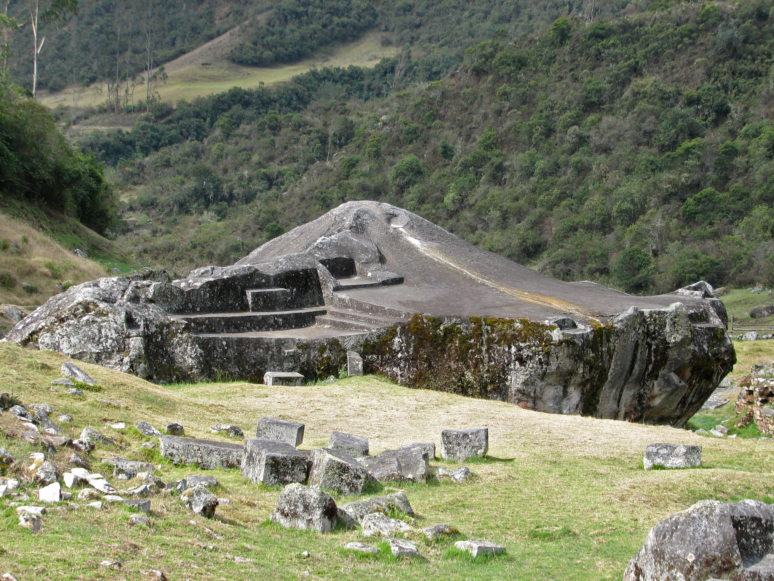 Vilcabamba Archaeological site ñusta hispana rock